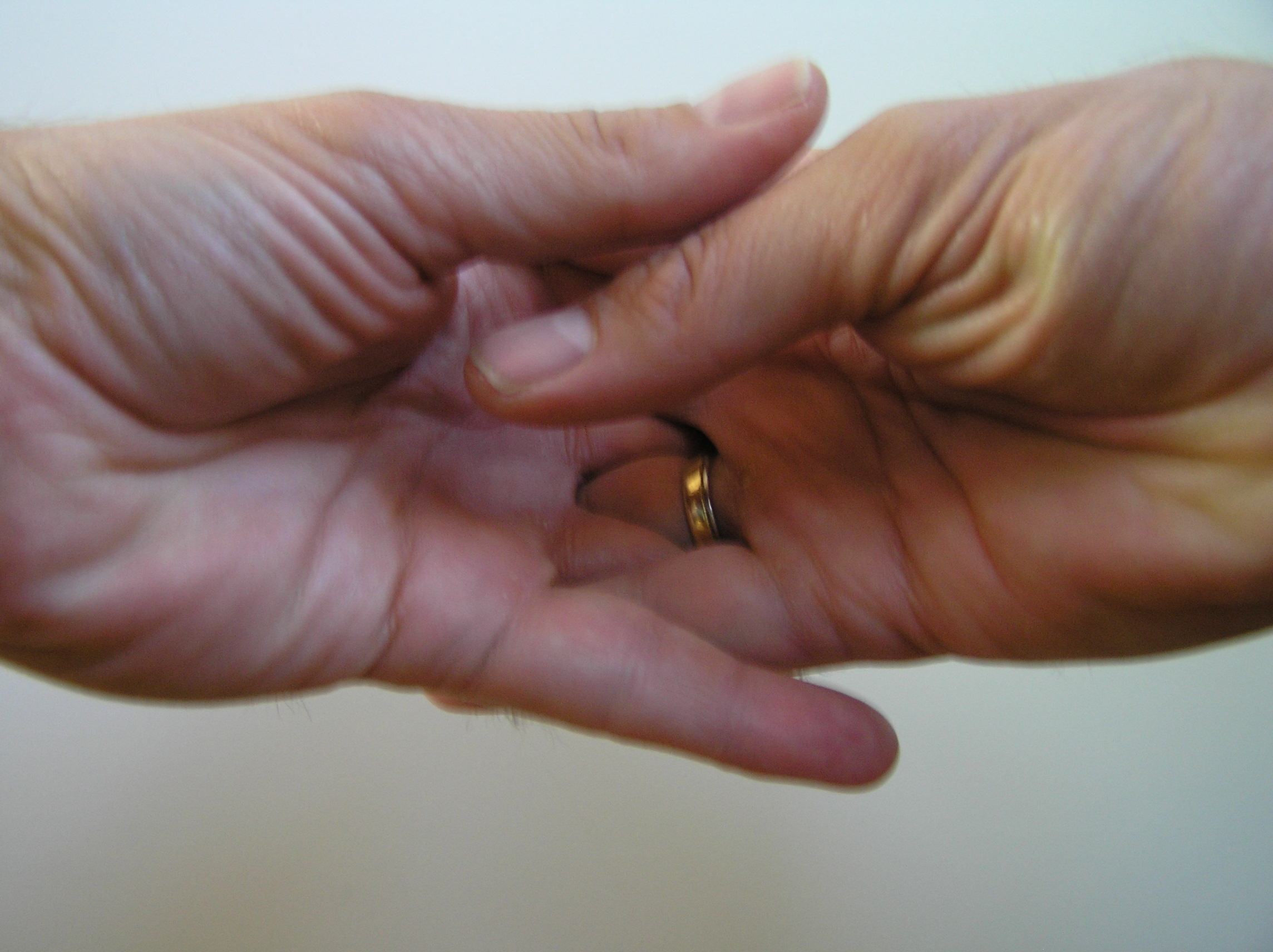 Duimen om iemand succes te wensen of geven